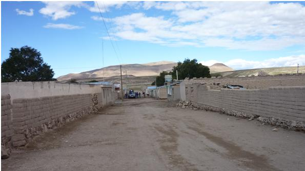 Calle tíóca de San Juan del Rosario, Municipio de Colcha K, Provincia de Nor Lípez, Departamento de Potosí, Bolivia.